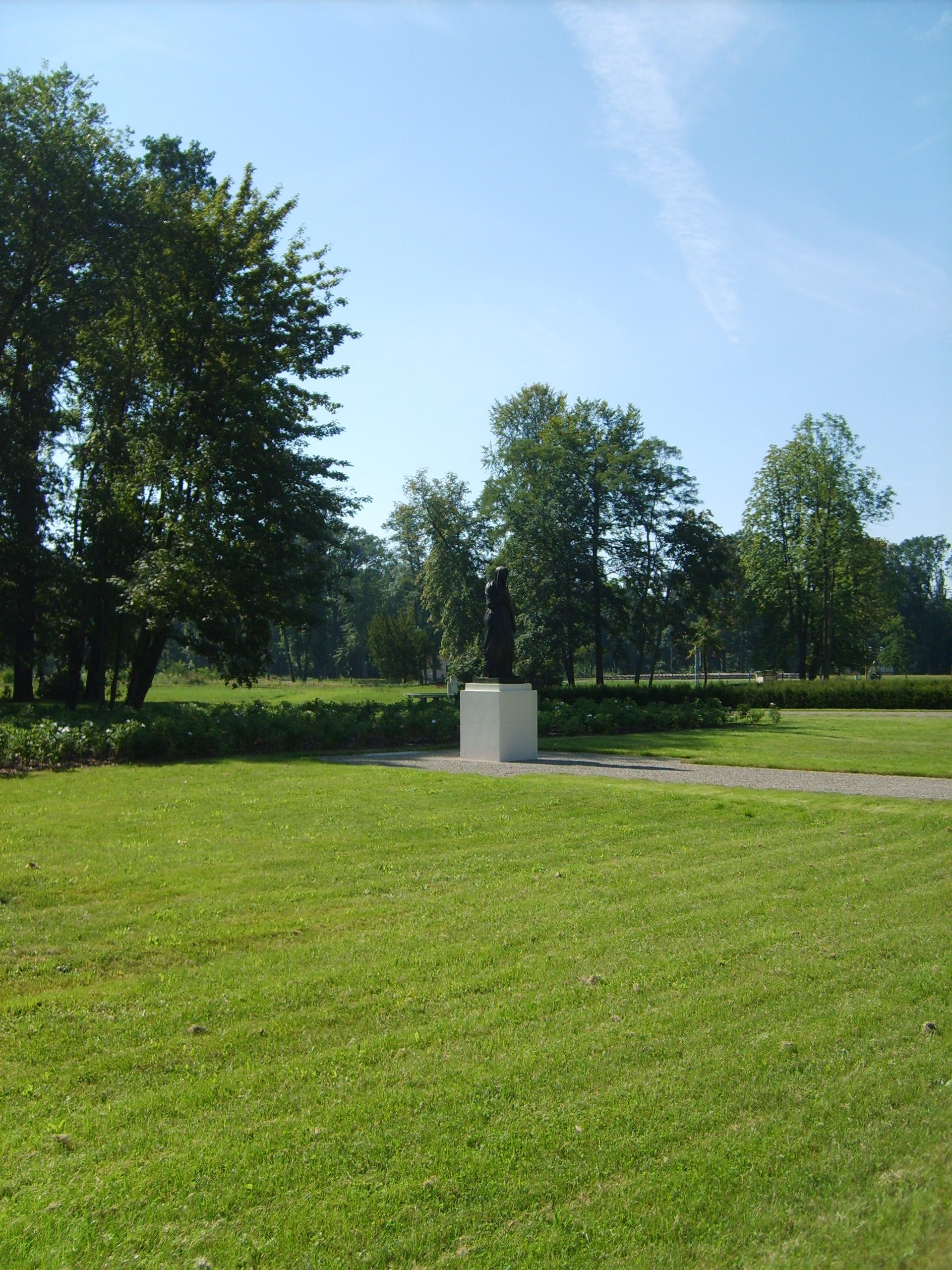 Schlosspark Lauchhammer-West